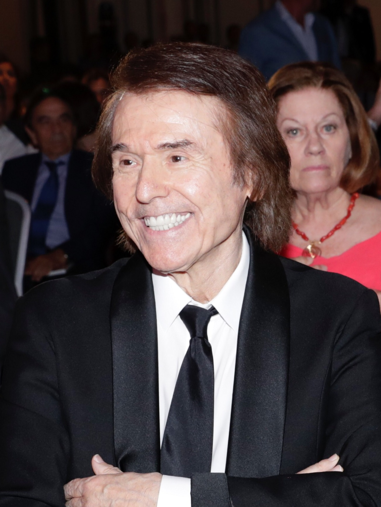 Raphael, recibiendo el premio Toda una Vida 2017 de Madridiario